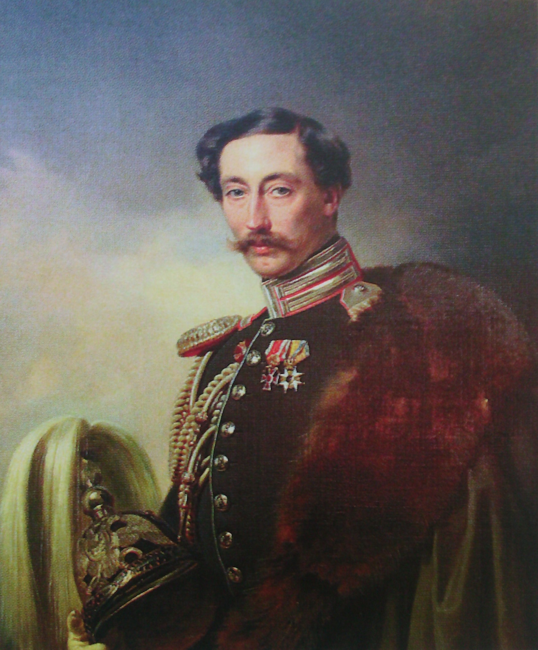 Князя Владимир Иванович Барятинский (1817—1875)